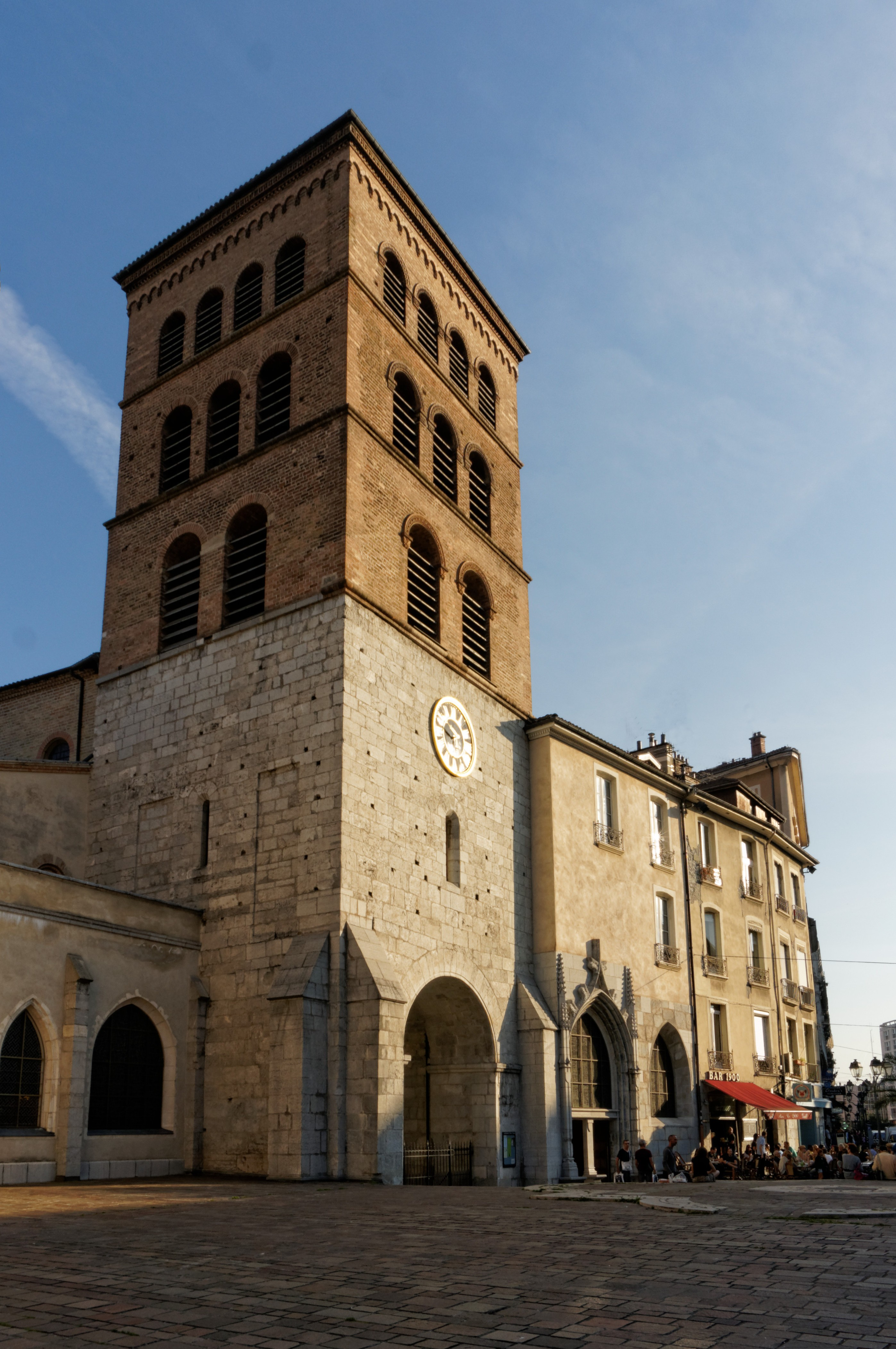 Cathédrale Notre-Dame de Grenoble